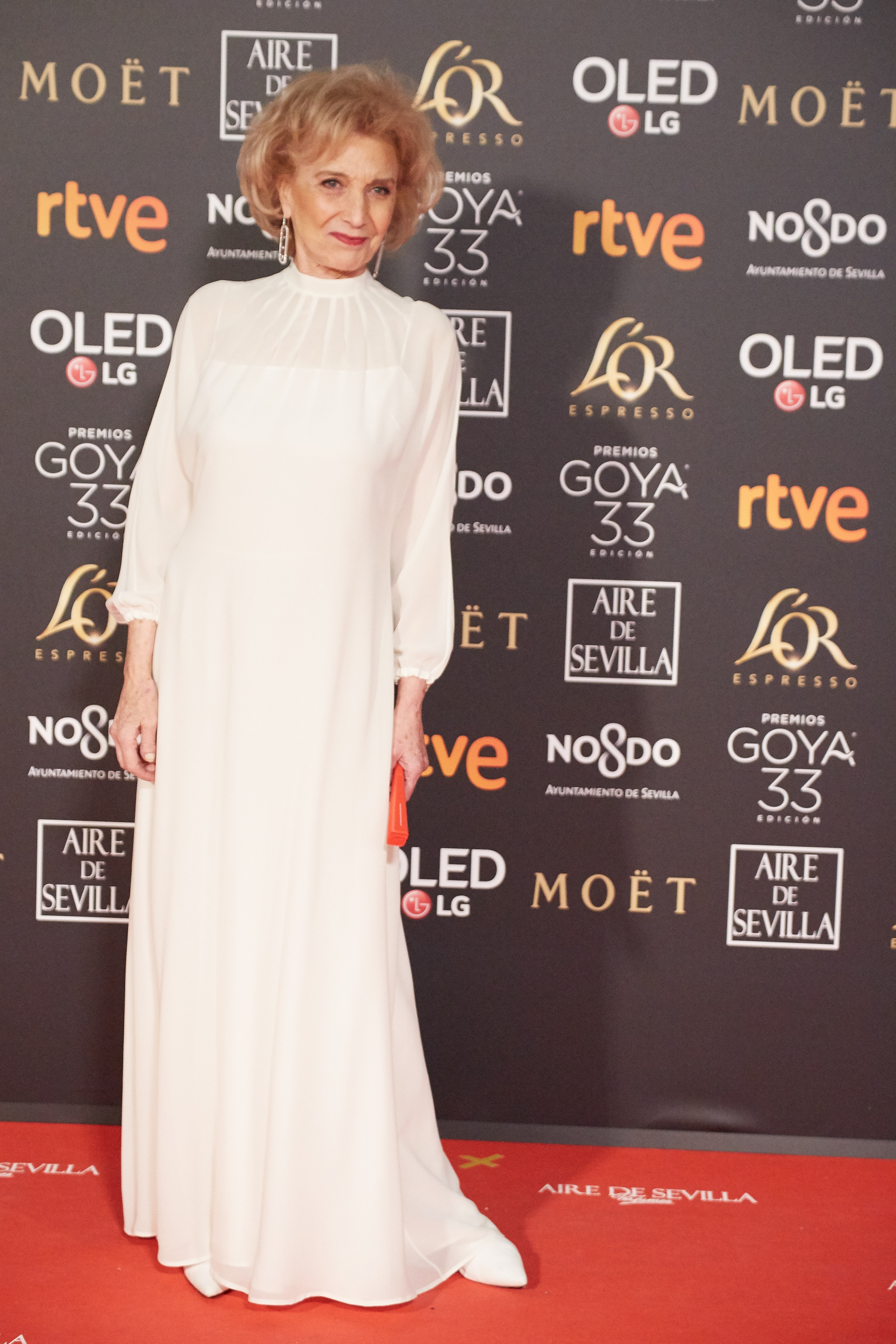 Marisa Paredes en la alfombra roja de los Premios Goya celebrados en Sevilla en Febrero 2019